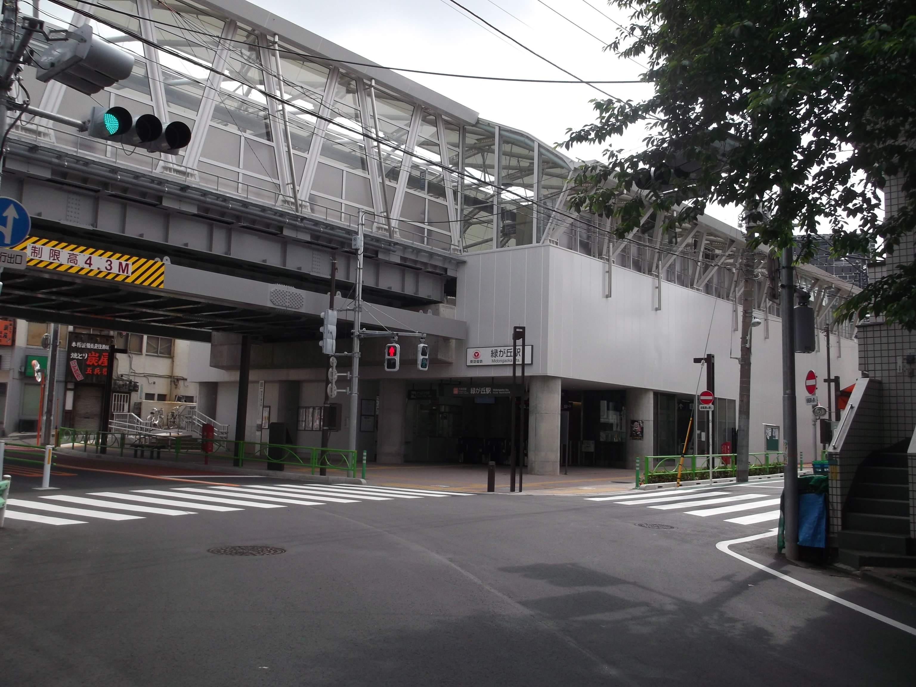 東急大井町線緑が丘駅舎